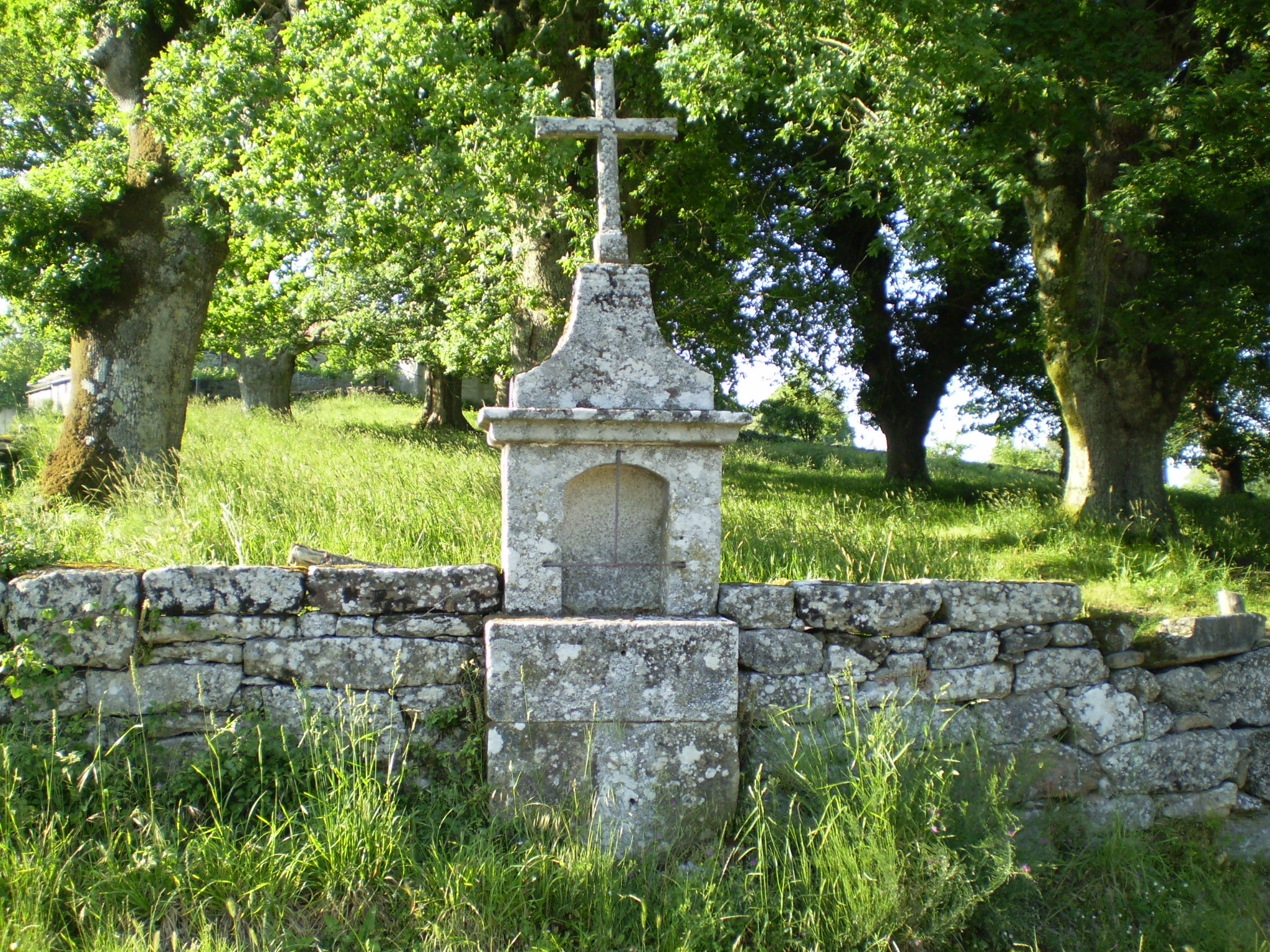 Peto de ánimas en Verín - Peibás (Antas de Ulla)